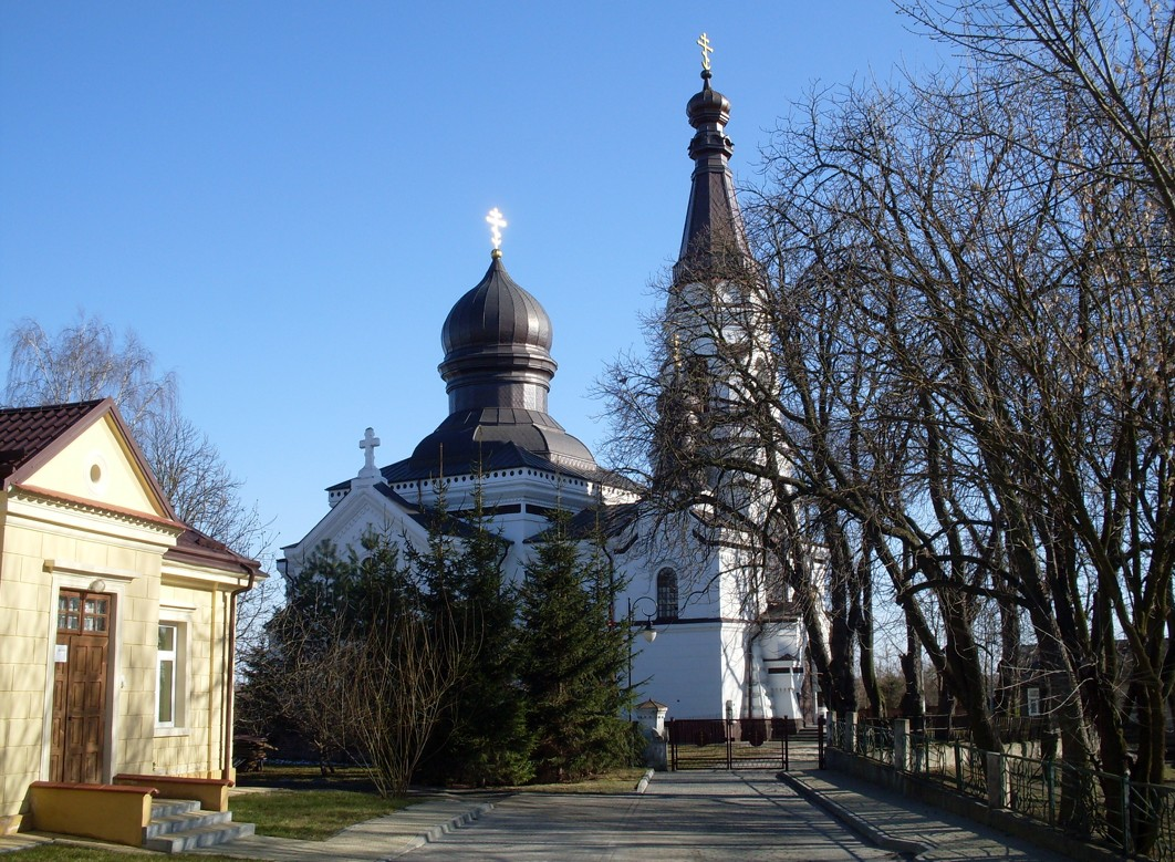 Cerkiew prawosławna p.w. Narodzenia Marii, mur., 1840-1842 we Włodawie